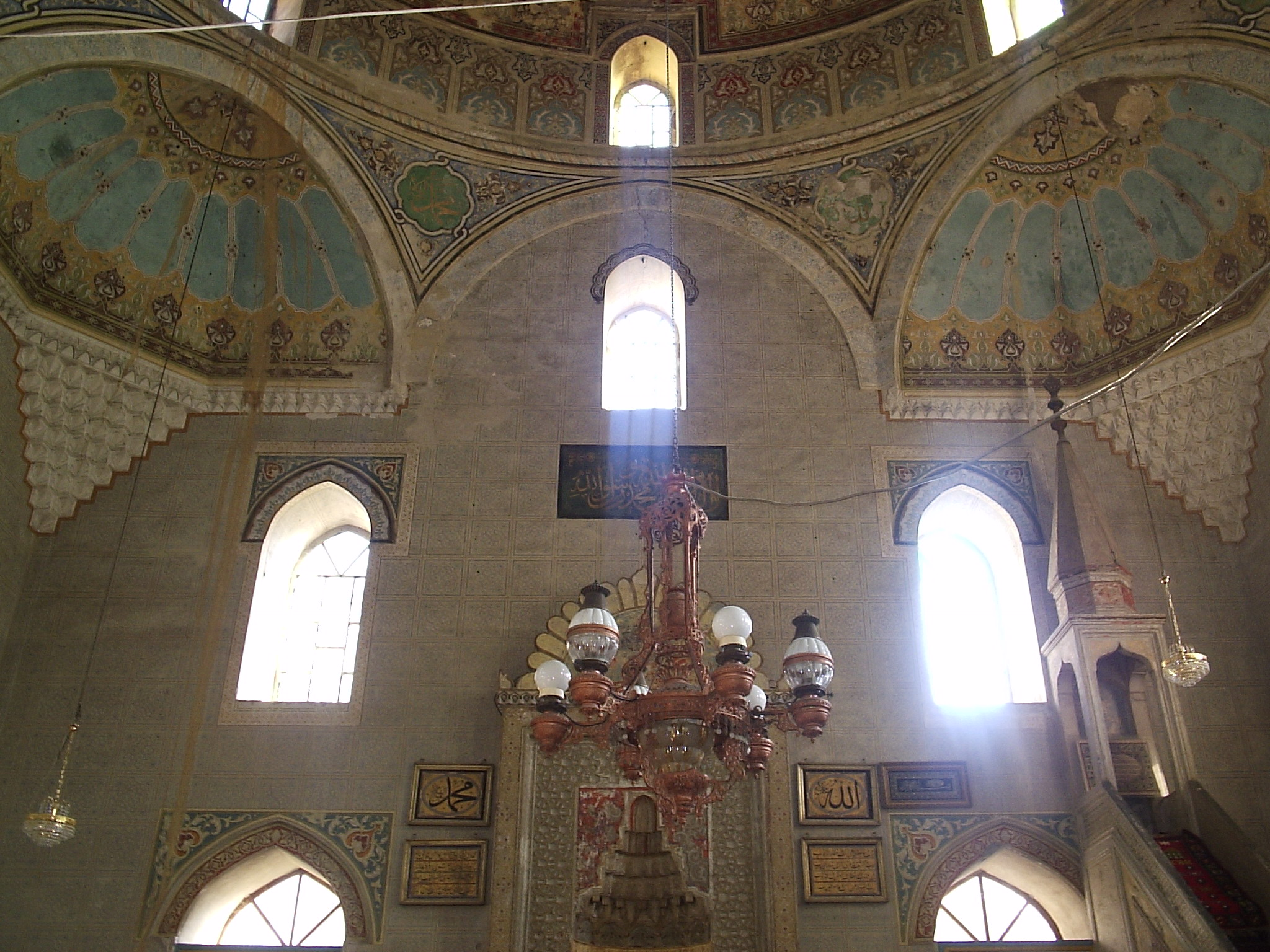 Enterijer Kuršumlije džamije izgrađena 1560. god., prije unutarnjeg renoviranja 2008.